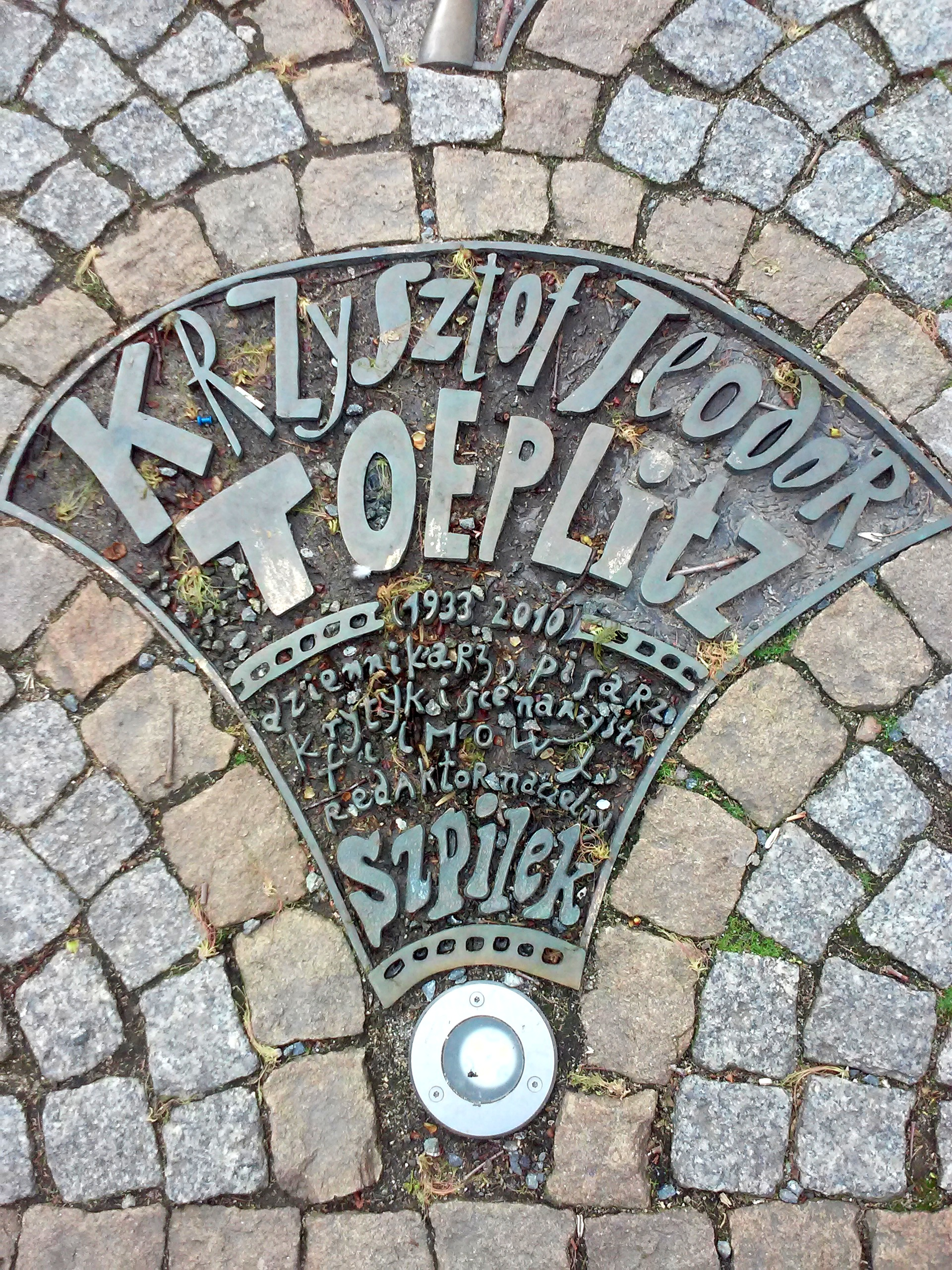 Legnica, Aleja Gwiazd Satyrykonu, tablica pamiątkowa - Krzysztof Teodor Toeplitz